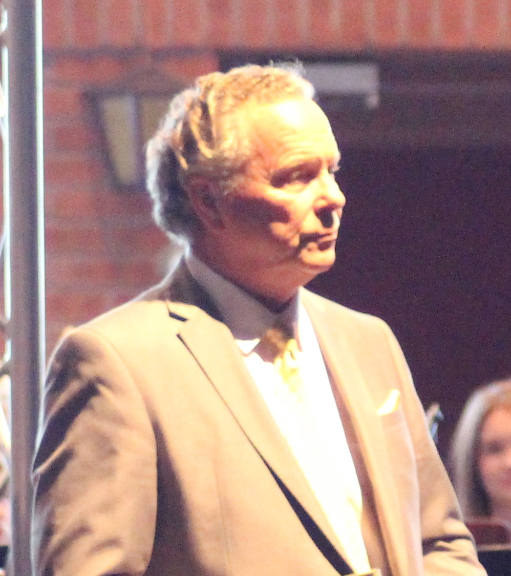 Lars Roos 31 maj 2013